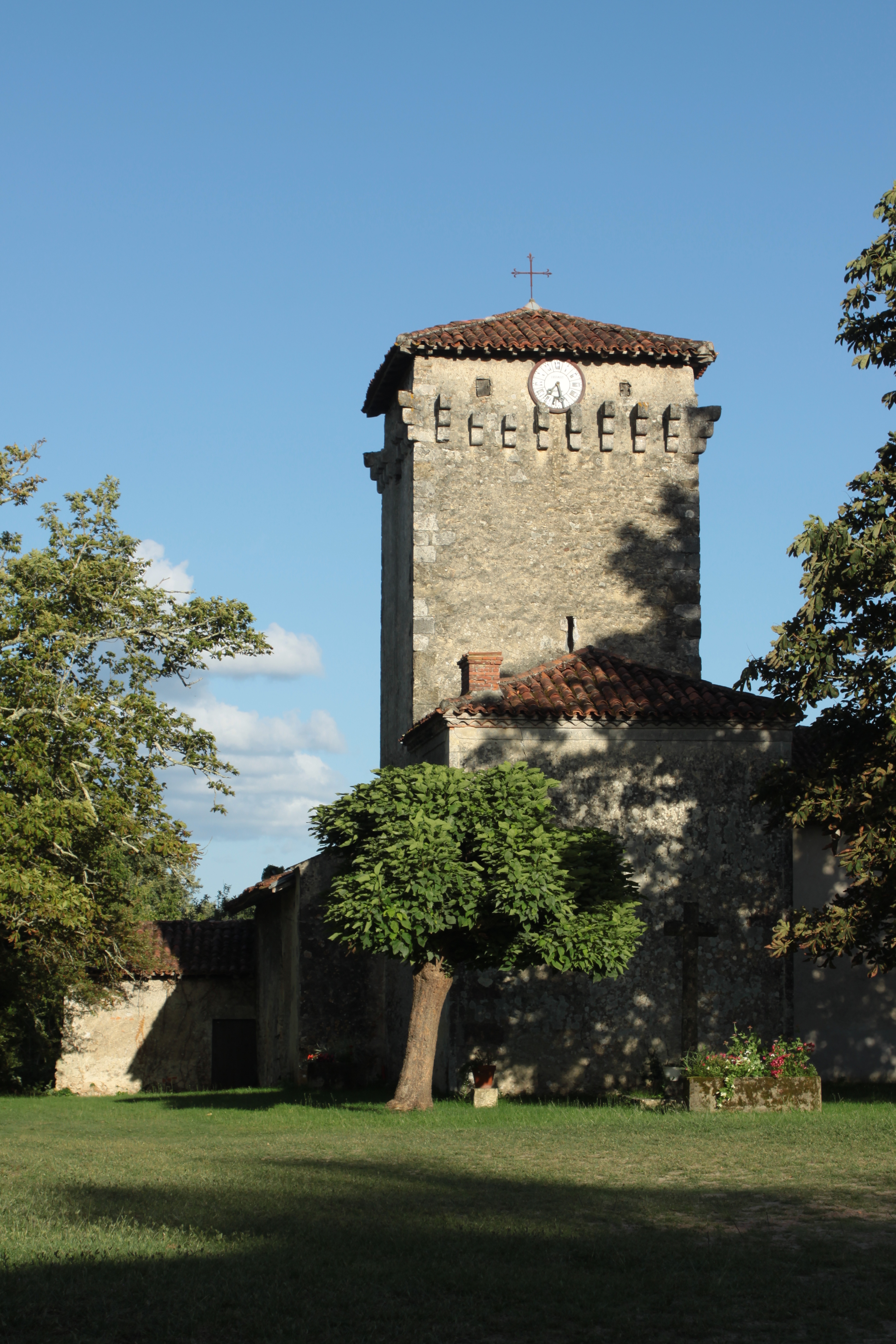 D'Kierch Saint-Pierre du Ginx bei Arue